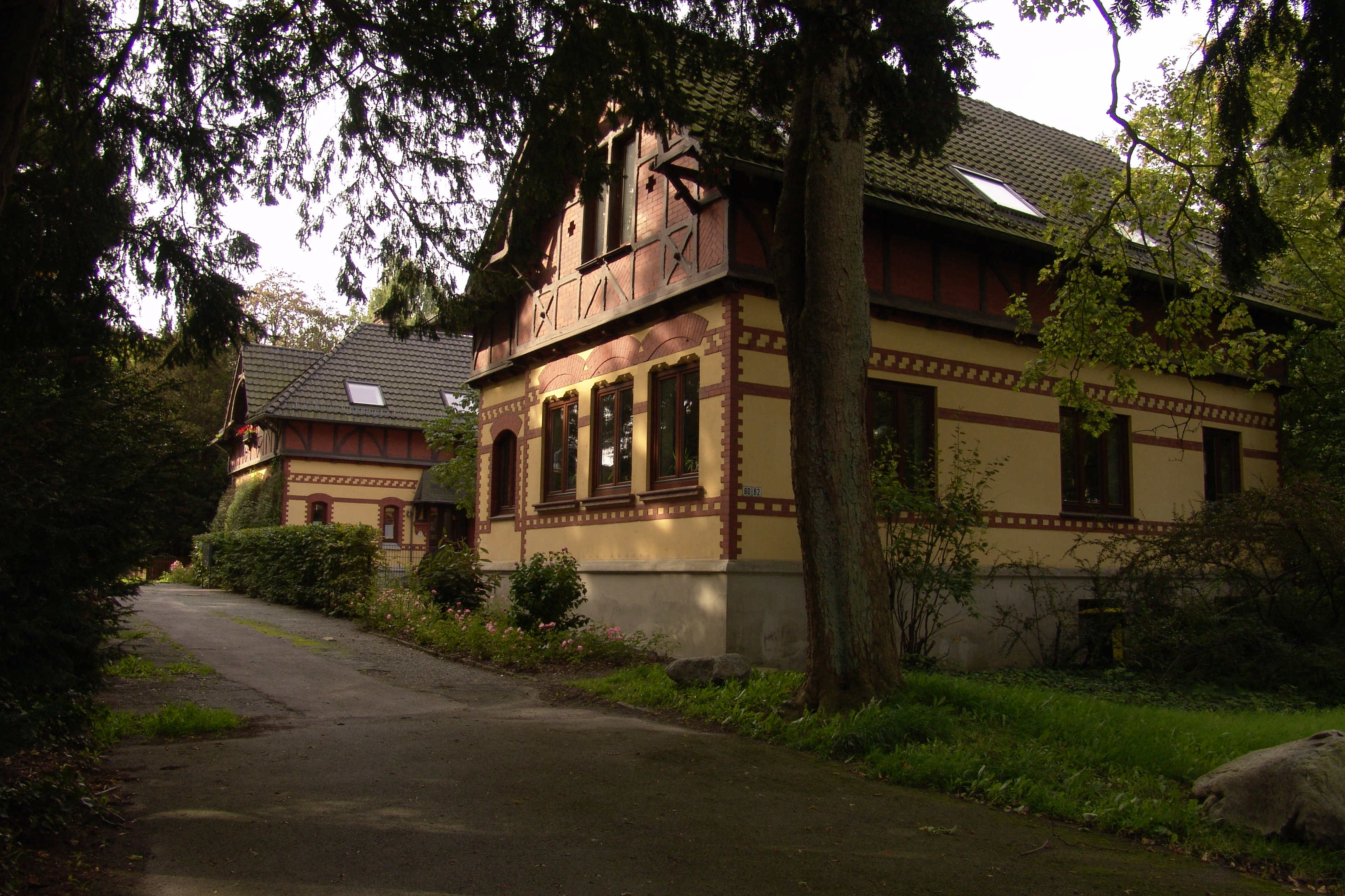 Hofmeierhaus Haus Schotteck in Bremen, Am Kapellenberg 1, 1A, 1B, 1C.Das abgebildete Objekt ist ein geschütztes Kulturdenkmal in der Freien Hansestadt Bremen, mit der Nr. 1806 beim Landesamt für Denkmalpflege registriert.